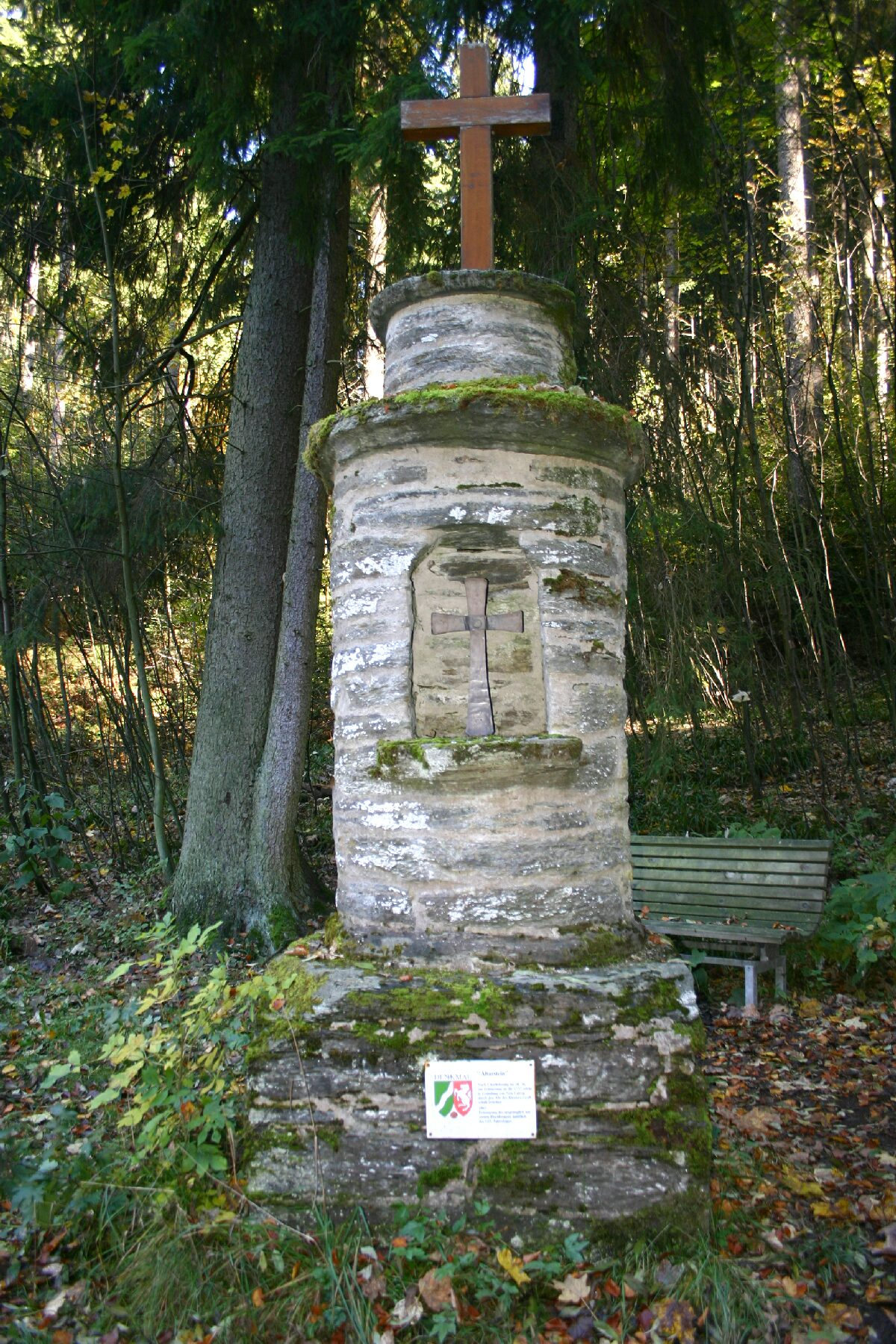 Altarstein im Grubental bei Latrop: steinerne Gedenksäule